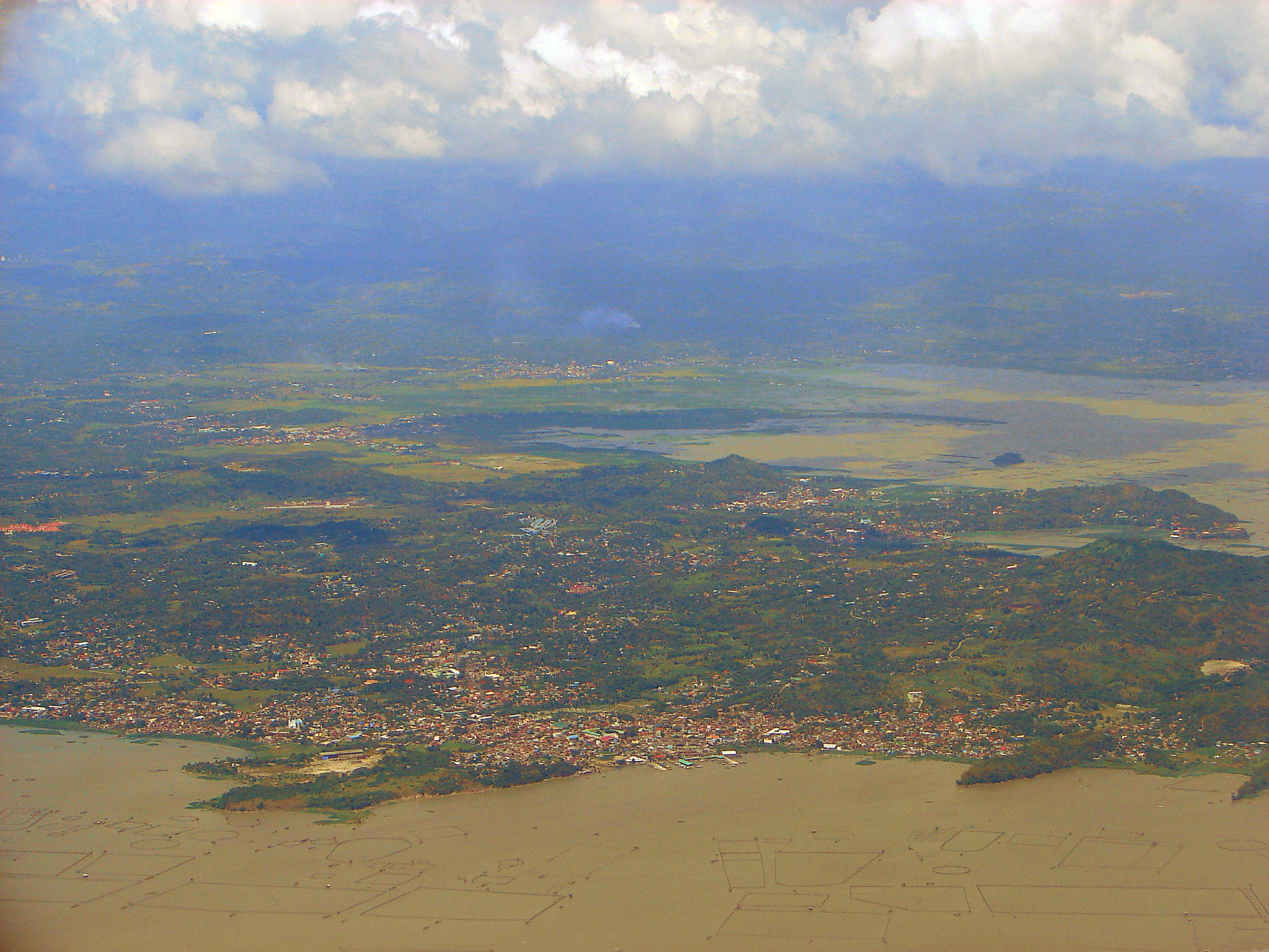 Binangonan, Rizal, Philippines